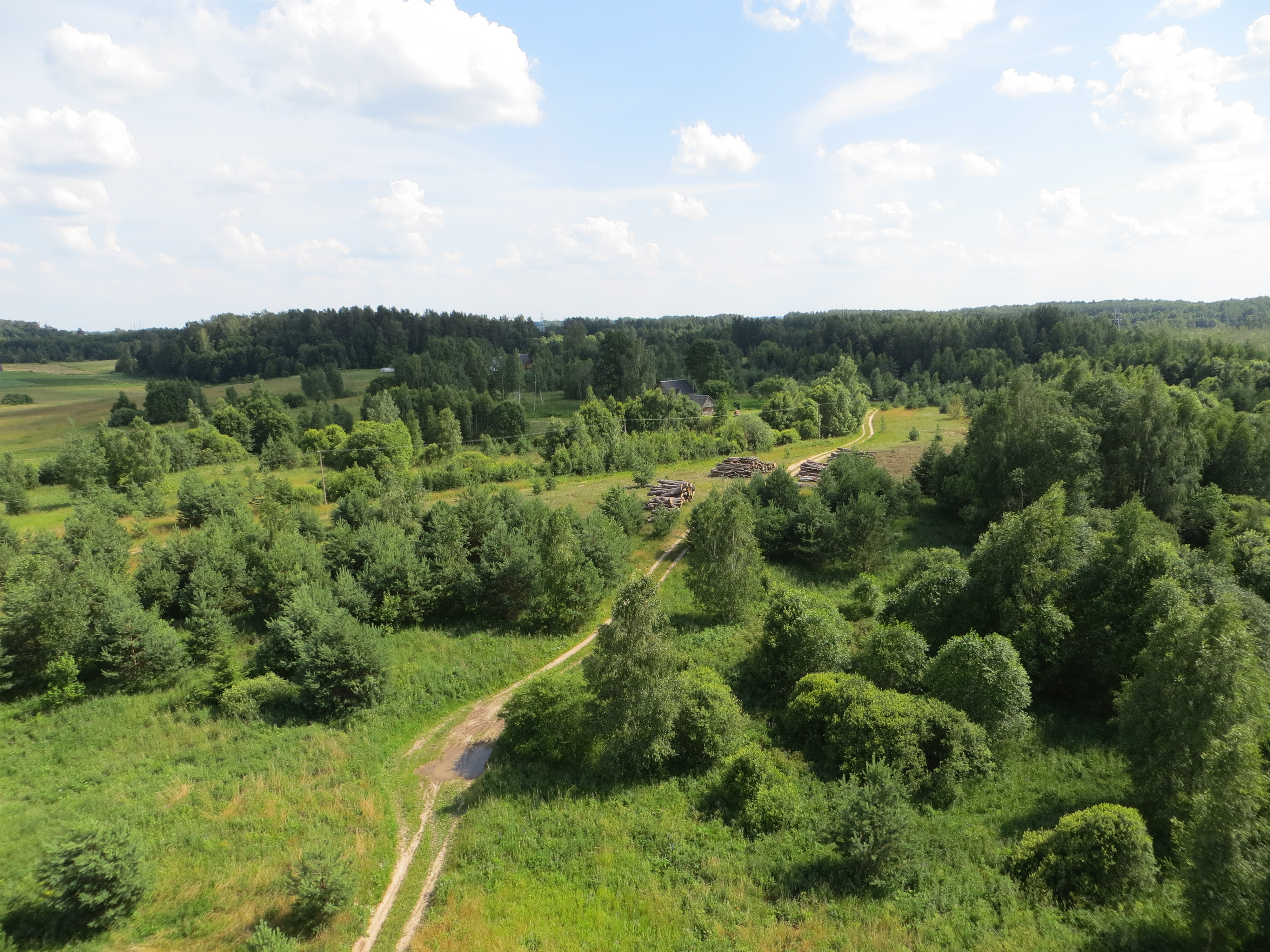 Dūkšto sen., Lithuania